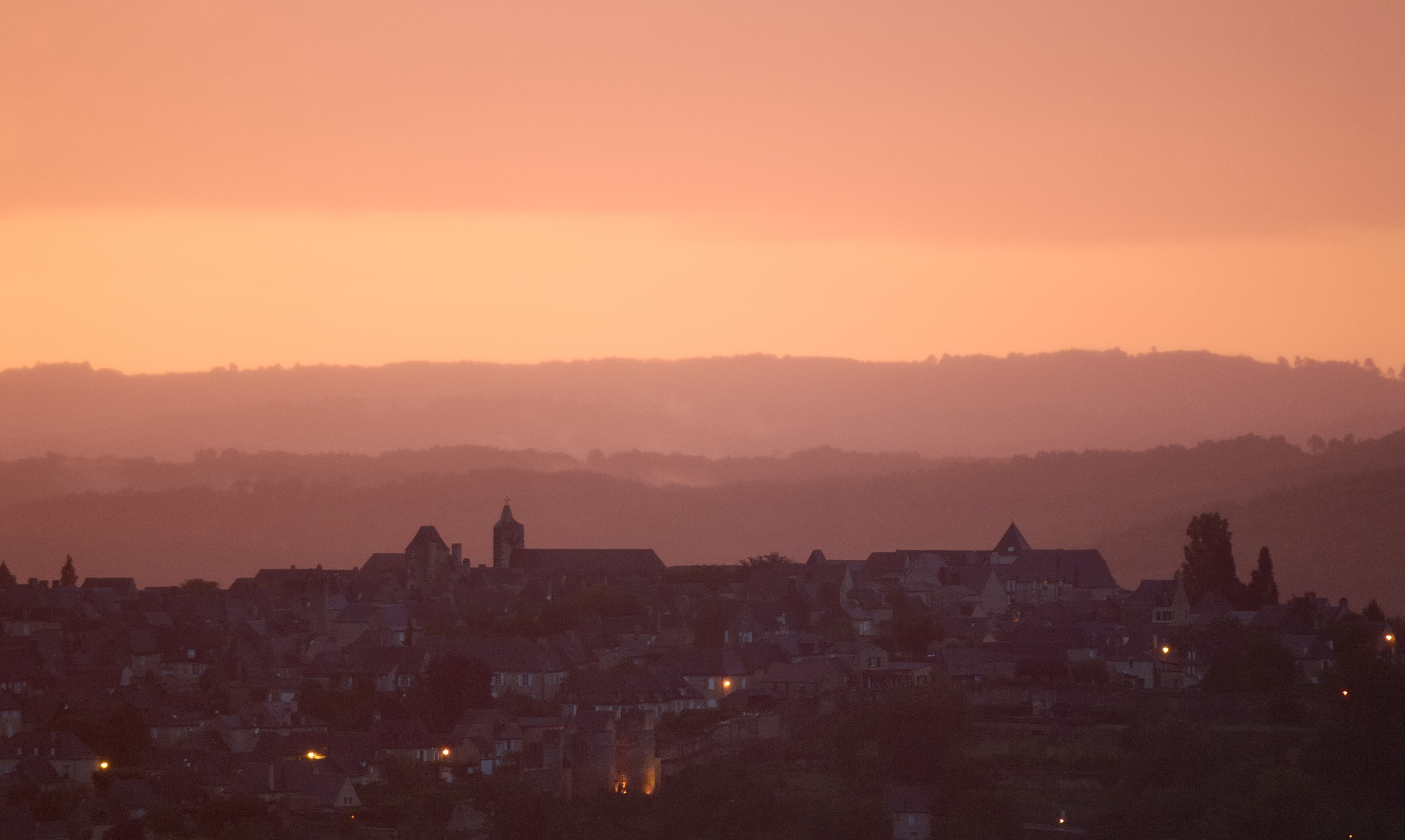 Couché de soleil sur Domme.